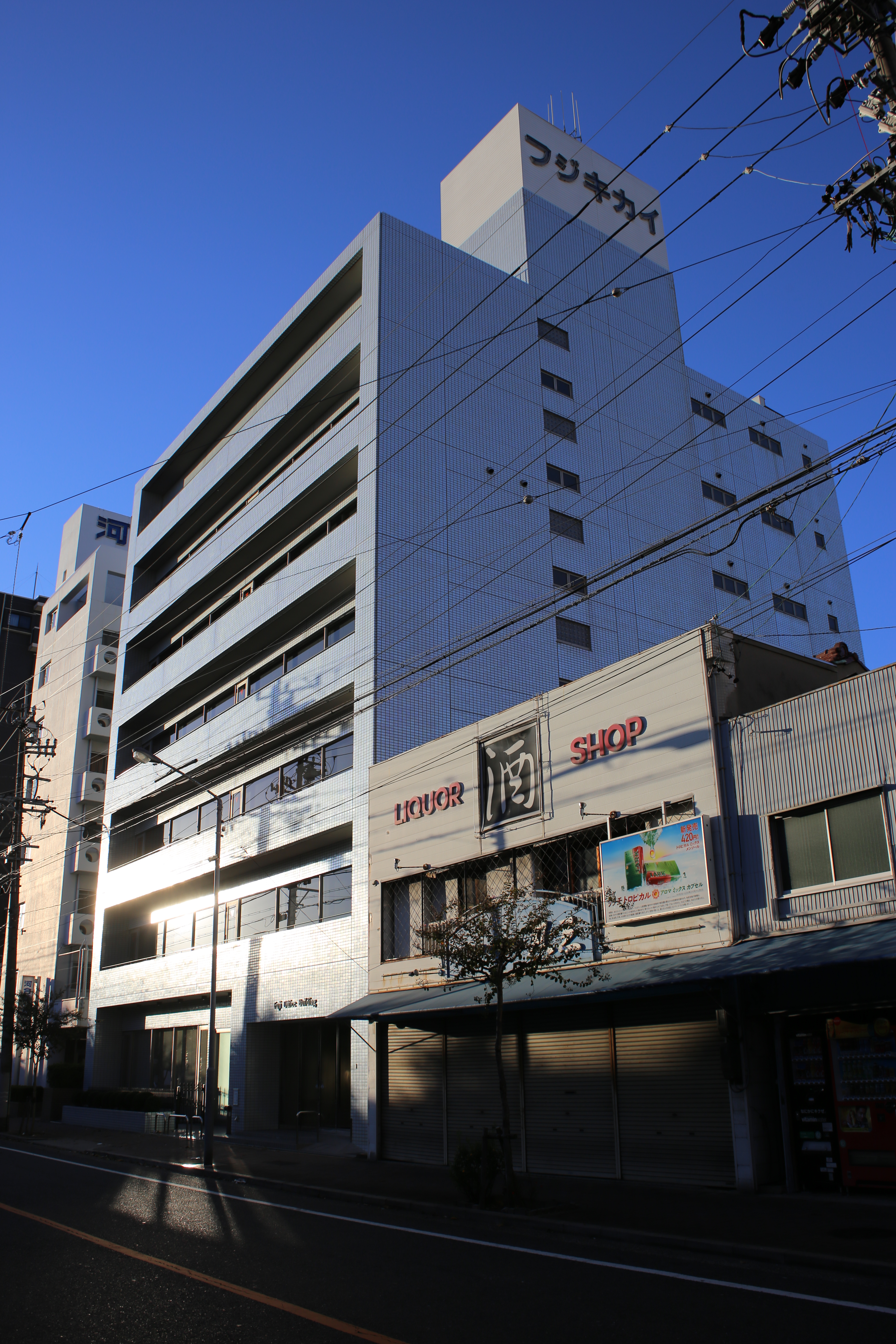 名古屋市中村区亀島二丁目のフジキカイ本社ビルを南側公道西側より撮影